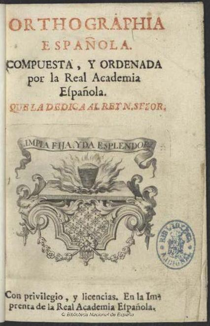 Orthographía Española [Texto impreso] compuesta y ordenada por la Real Academia Española .... - [Madrid] : en la Imprenta de la Real Academia Española, [1741? ]. - [1] en bl., [16], 358 p., IV h. de lám. pleg. ; 8º. Signatura 3/68869